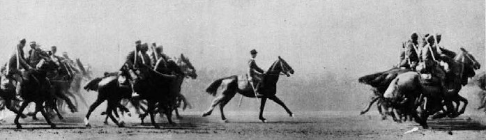 Vojna parada kraljeve jugoslovanske vojske v Beogradu - konjenica